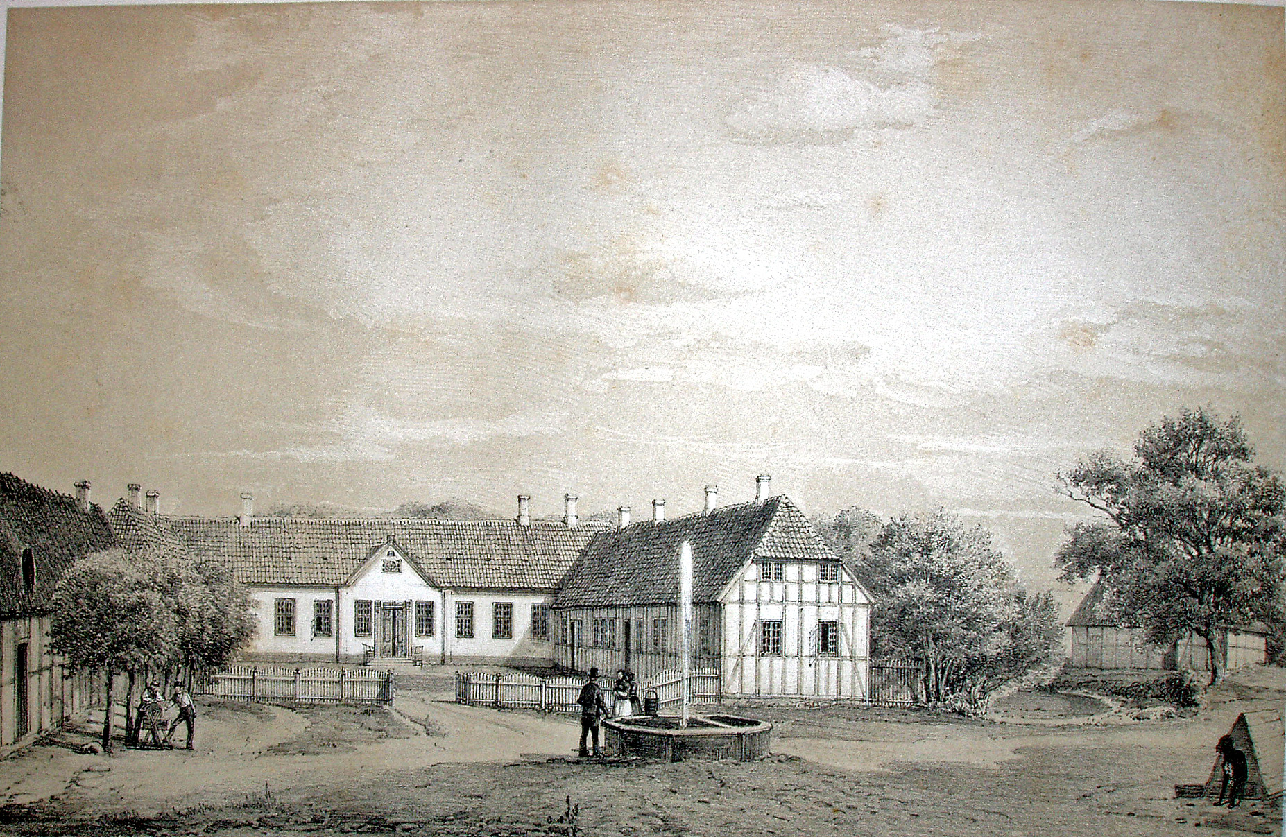 Ristrup Gods ligger i Sabro Sogn, Sabro Herred, Århus Kommune. Ristrups hovedbygning er opført 1755